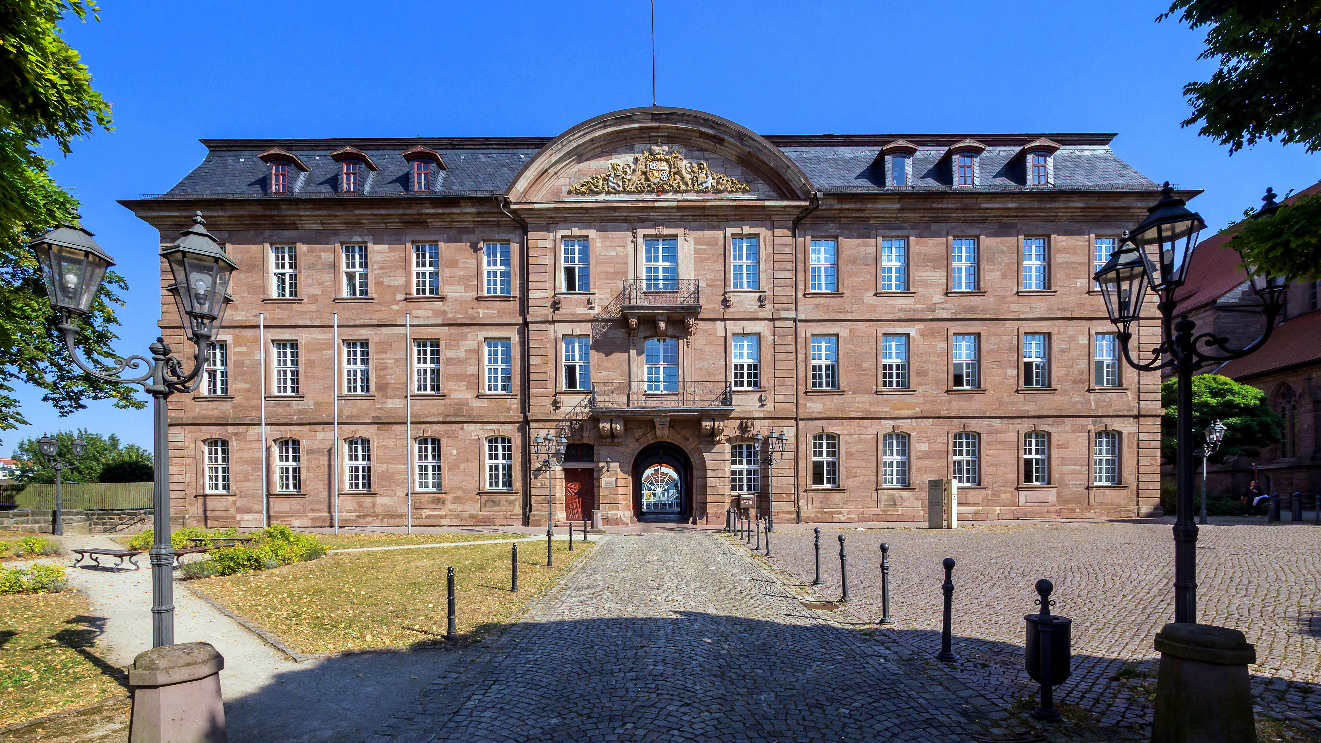 Heilbad Heiligenstadt Friedensplatz 8 Kurmainzisches Schloss und ehemaliges Oberamtshaus 1